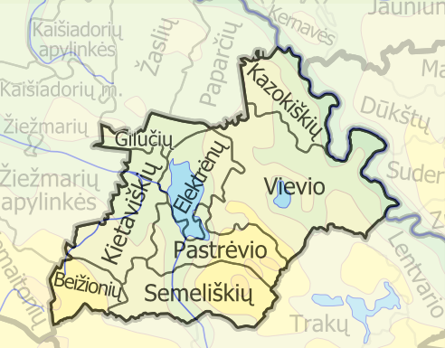 Padaryta iš lt::image:LietuvosSeniunijos.png